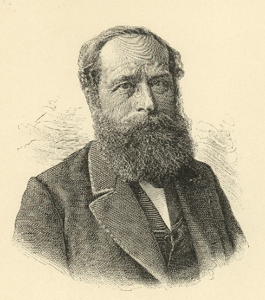 Porträt von Johann Ulrich Eisenhut, Gais (Nr. 224)